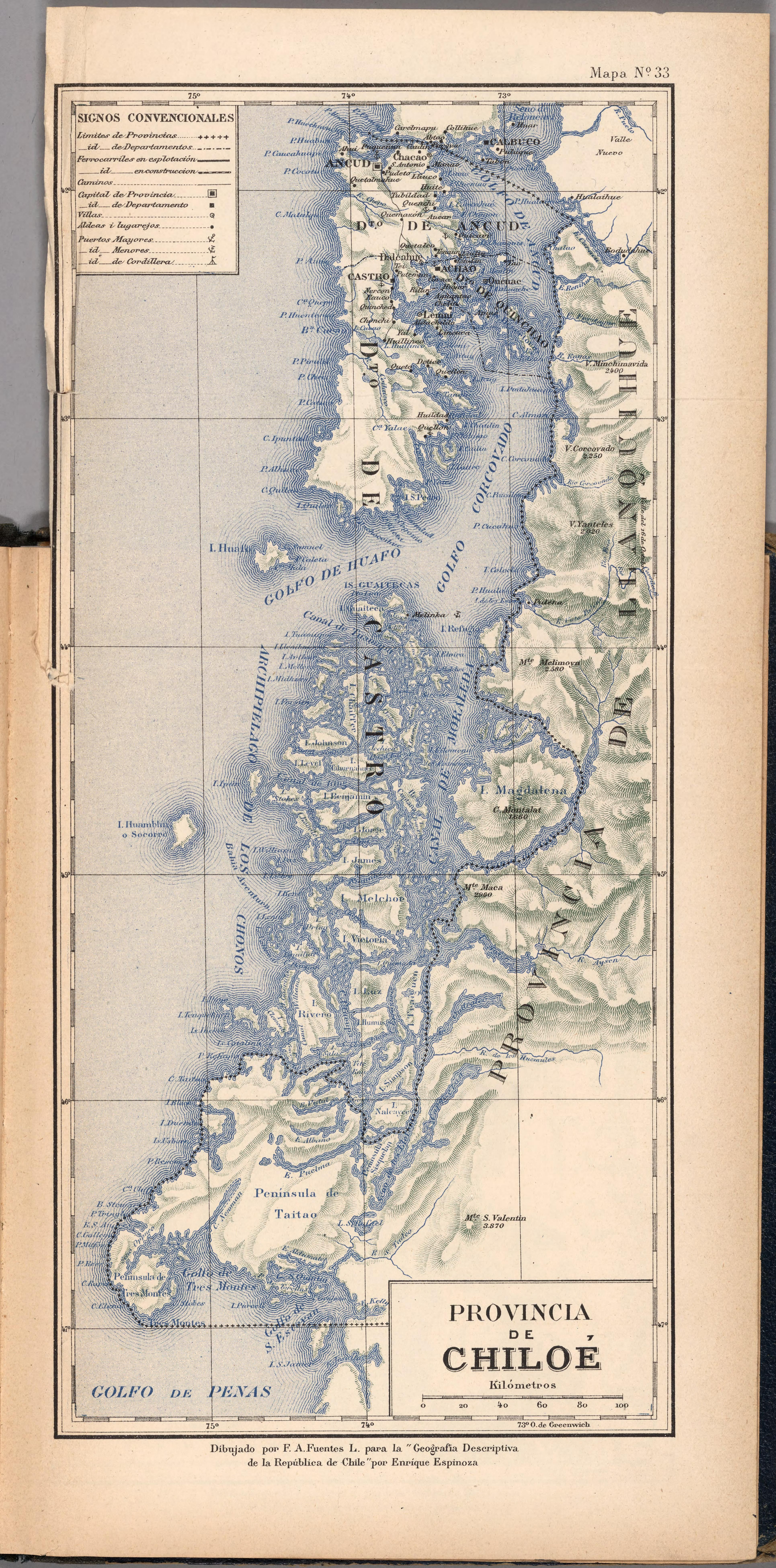 Atlas de Chile Arreglado para la Jeografia Descriptiva de la Republica de Chile por Enrique Espinoza.